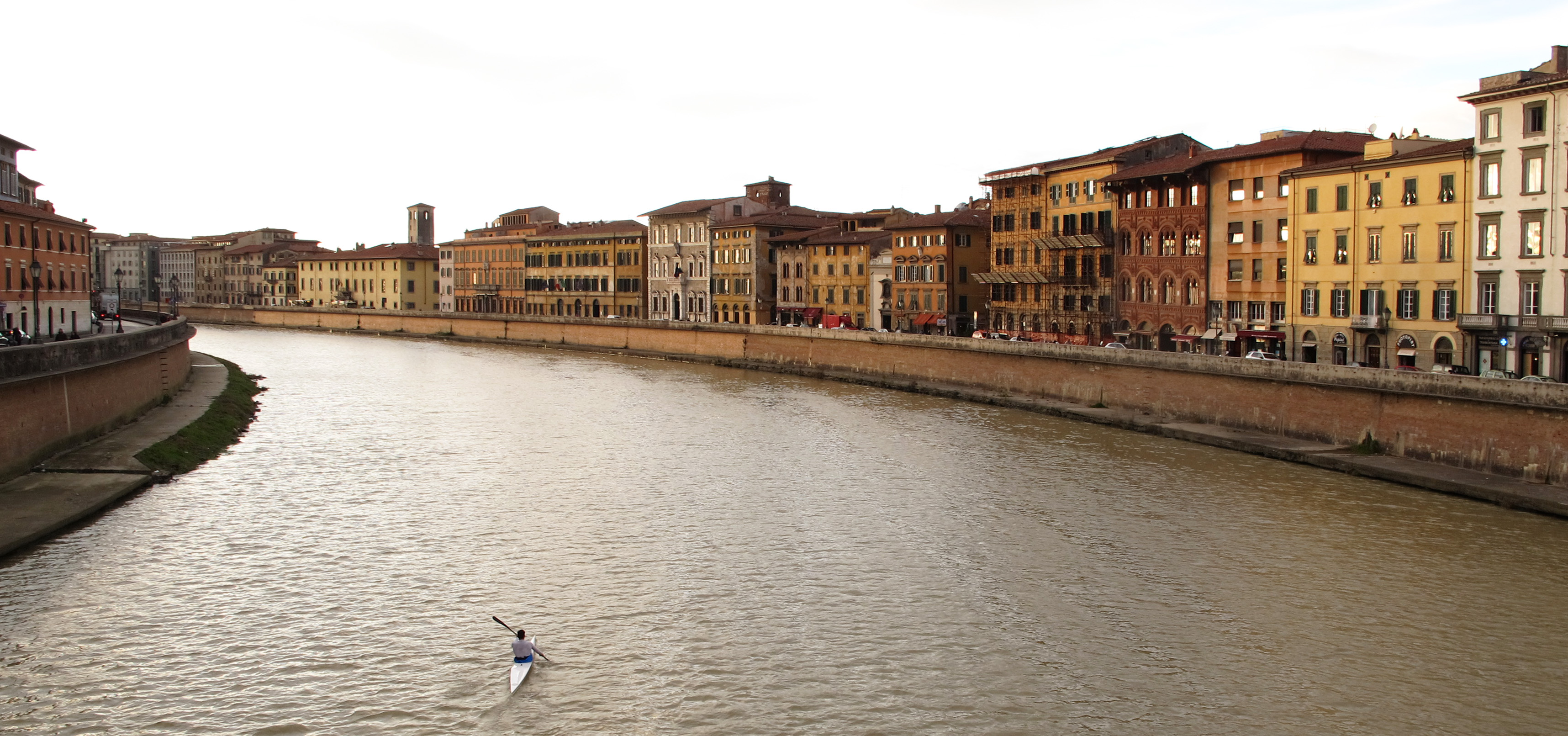 Pise, fleuve Arno, Italie